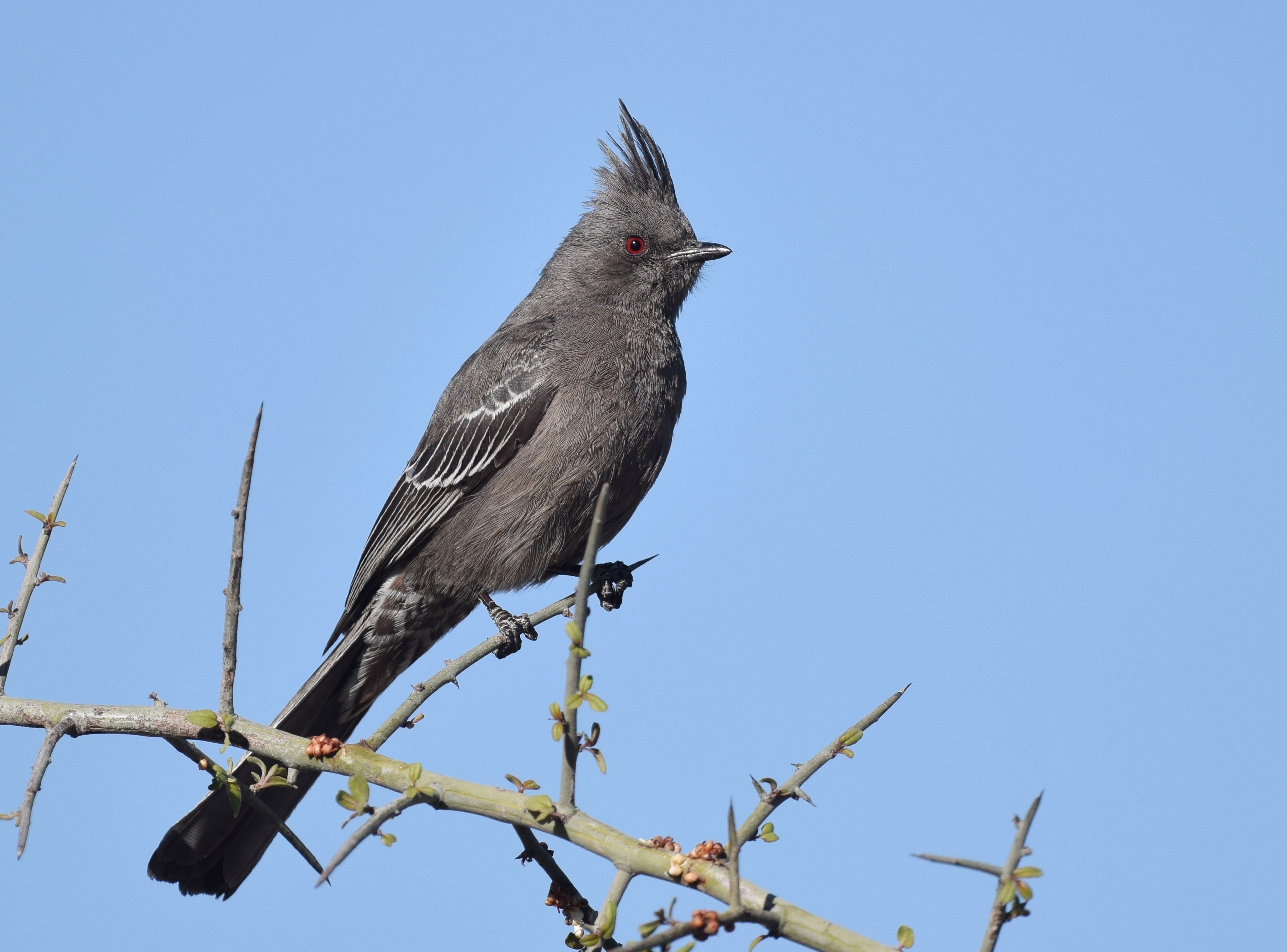 Tucson, Arizona 4/4/17